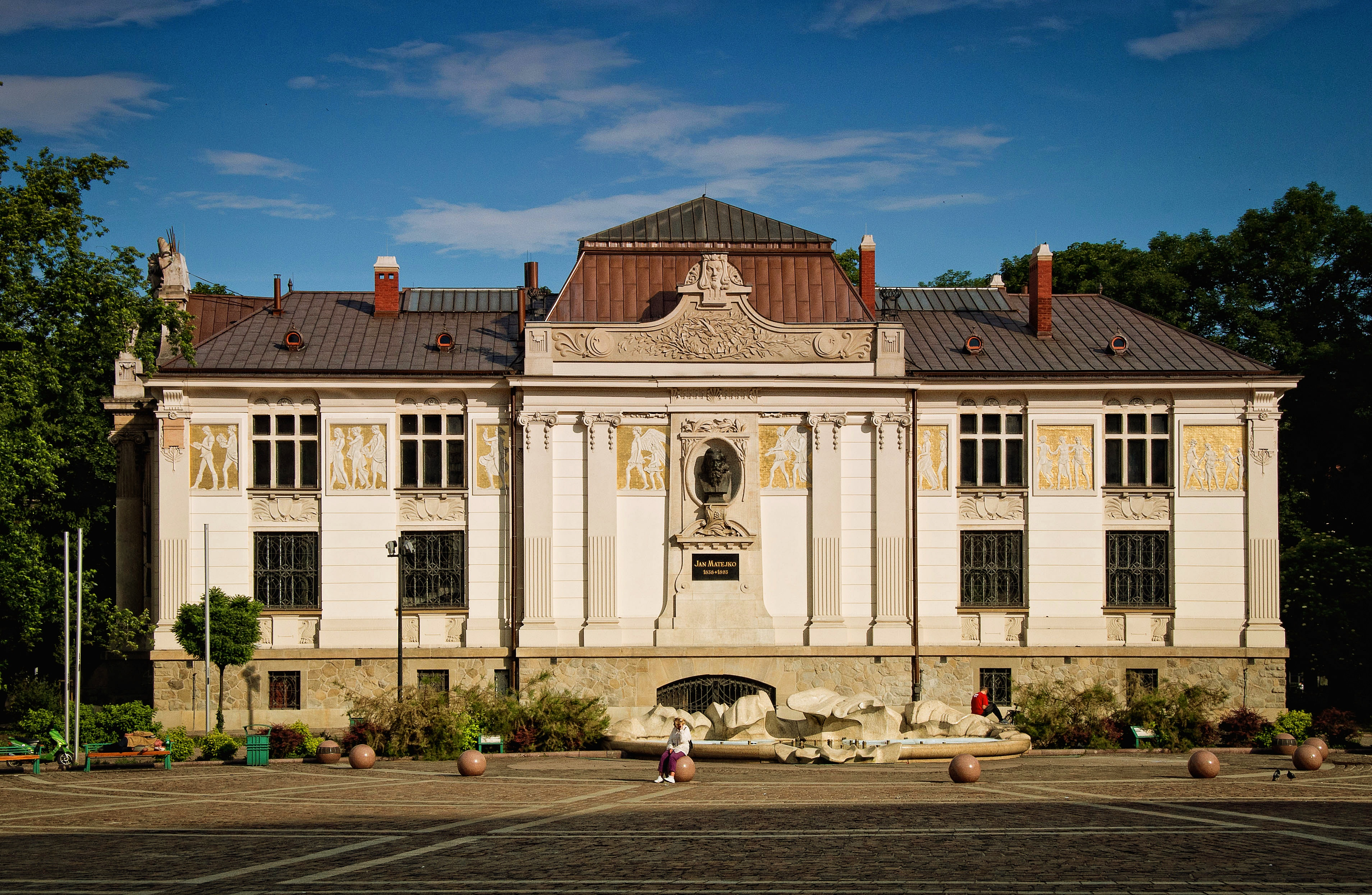 Kraków, pałac Sztuki TPST, 1898-1901